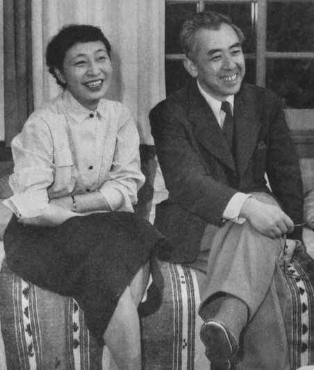 田中薫・千代夫妻